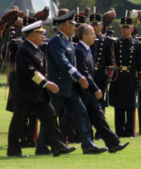 Felipe Calderón, presidente de los Estados Unidos Mexicanos con los secretarios de la Defensa Nacional y de la Marina.